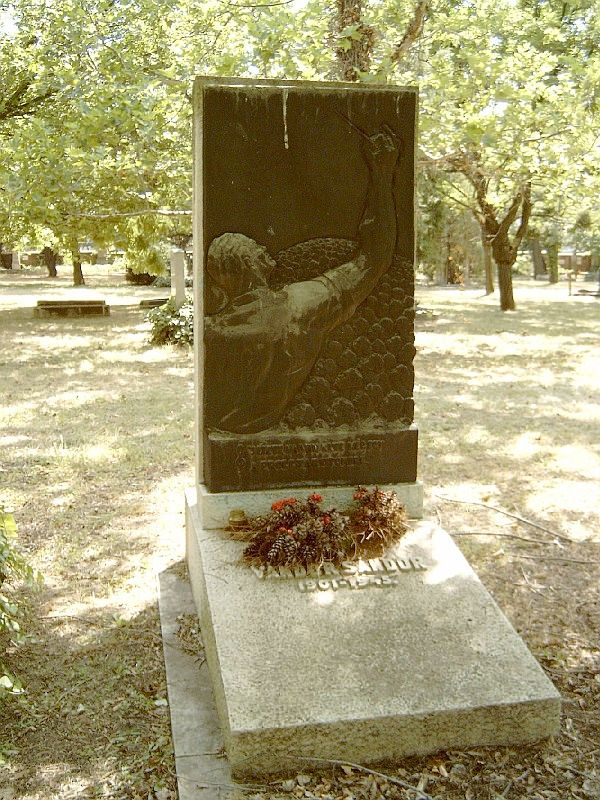 Vándor Sándor, Venetianer (Miskolc, 1901. július 28. – Sopronbánfalva, 1945. január 14.) karmester és zeneszerző sírja Budapesten. Kerepesi temető: 24-1-75 [szobrász: Farkas Aladár].